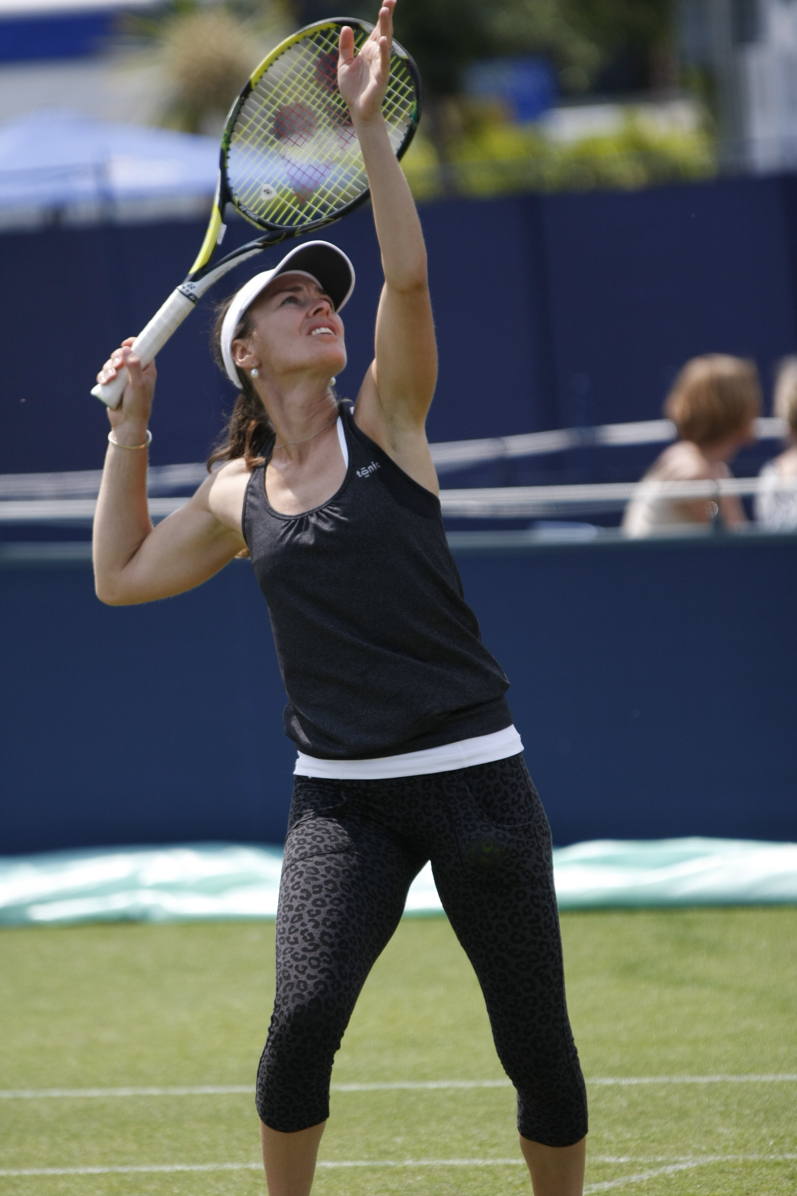 Martina Hingis